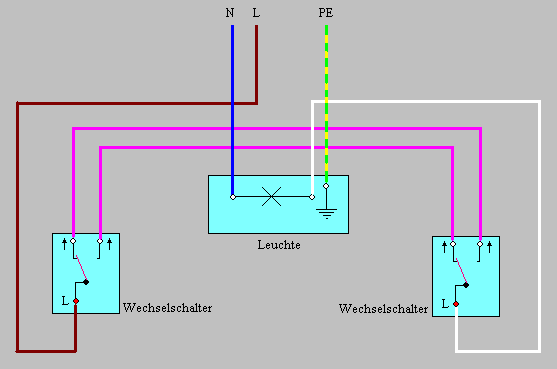 Wechselschaltung